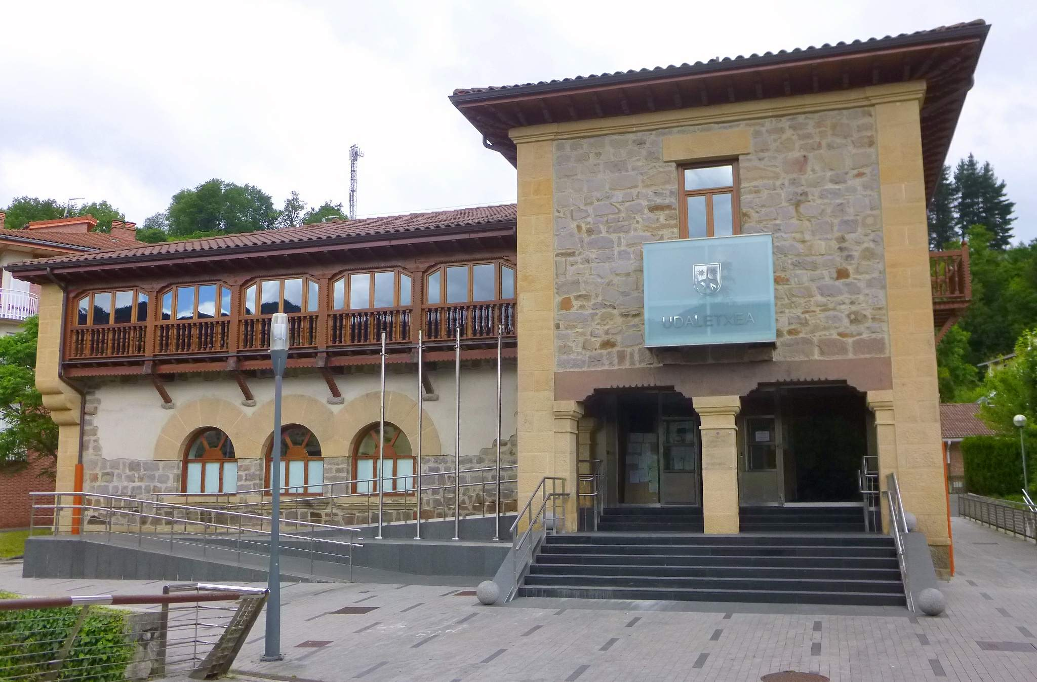 Ayuntamiento de Idiazabal (Gipuzkoa)